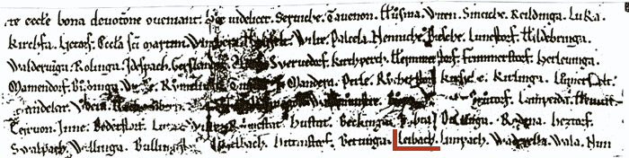 Auszug auf Wallfahrtsregister Erzbischofs Theoderichs von 1222